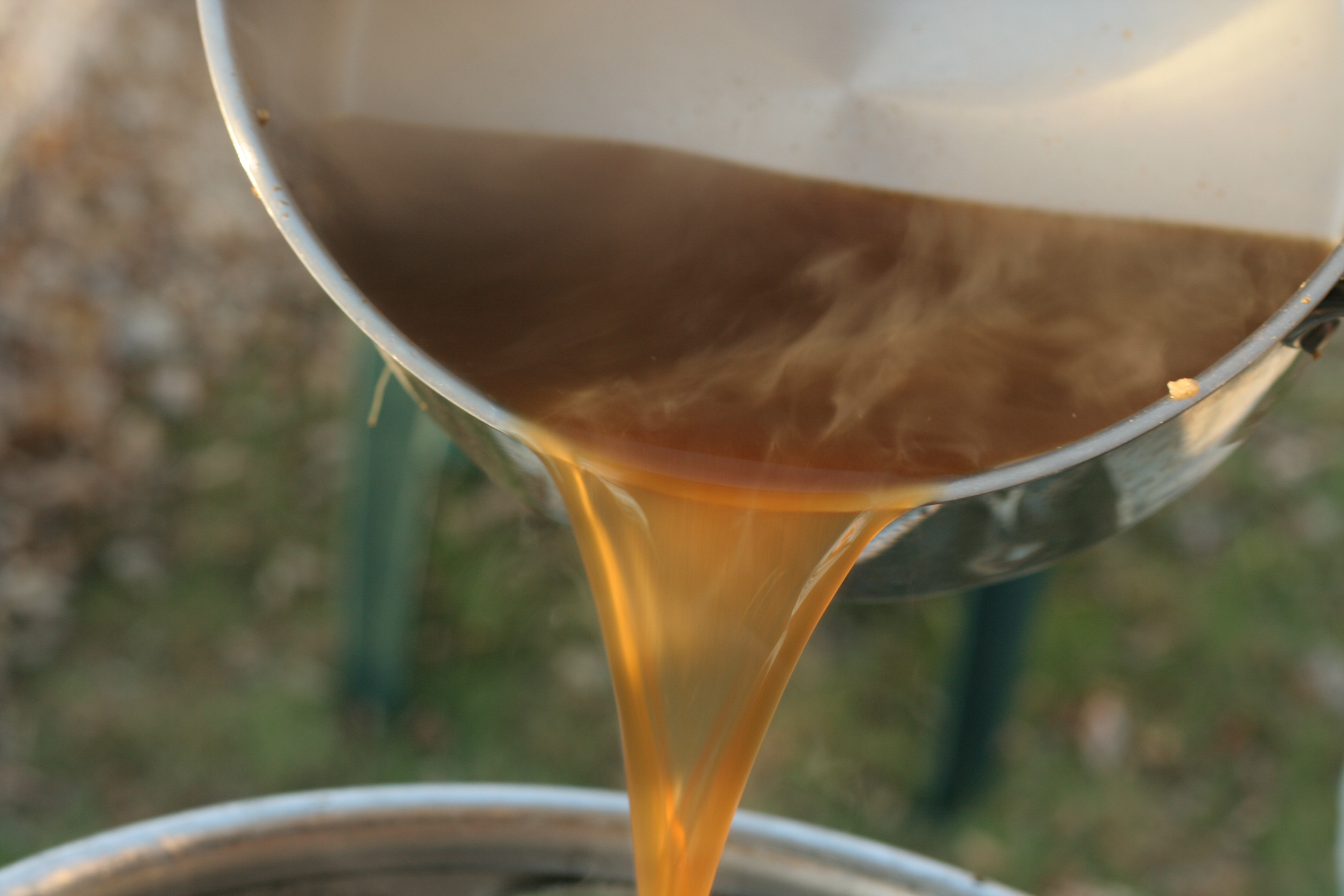 Brzeczka przygotowana do produkcji piwa